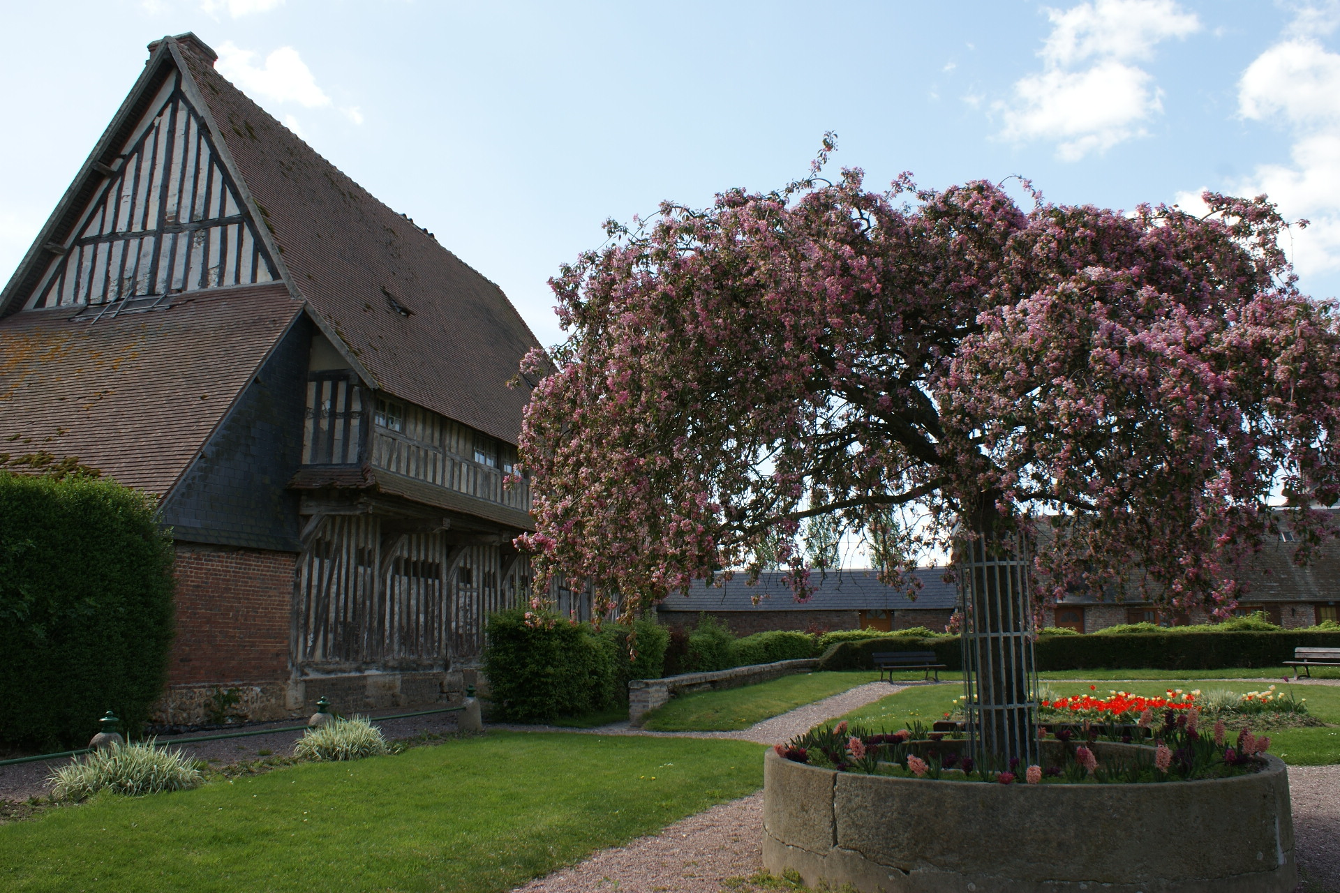 Manoir de Prémare ; le jardin public en avant-plan.